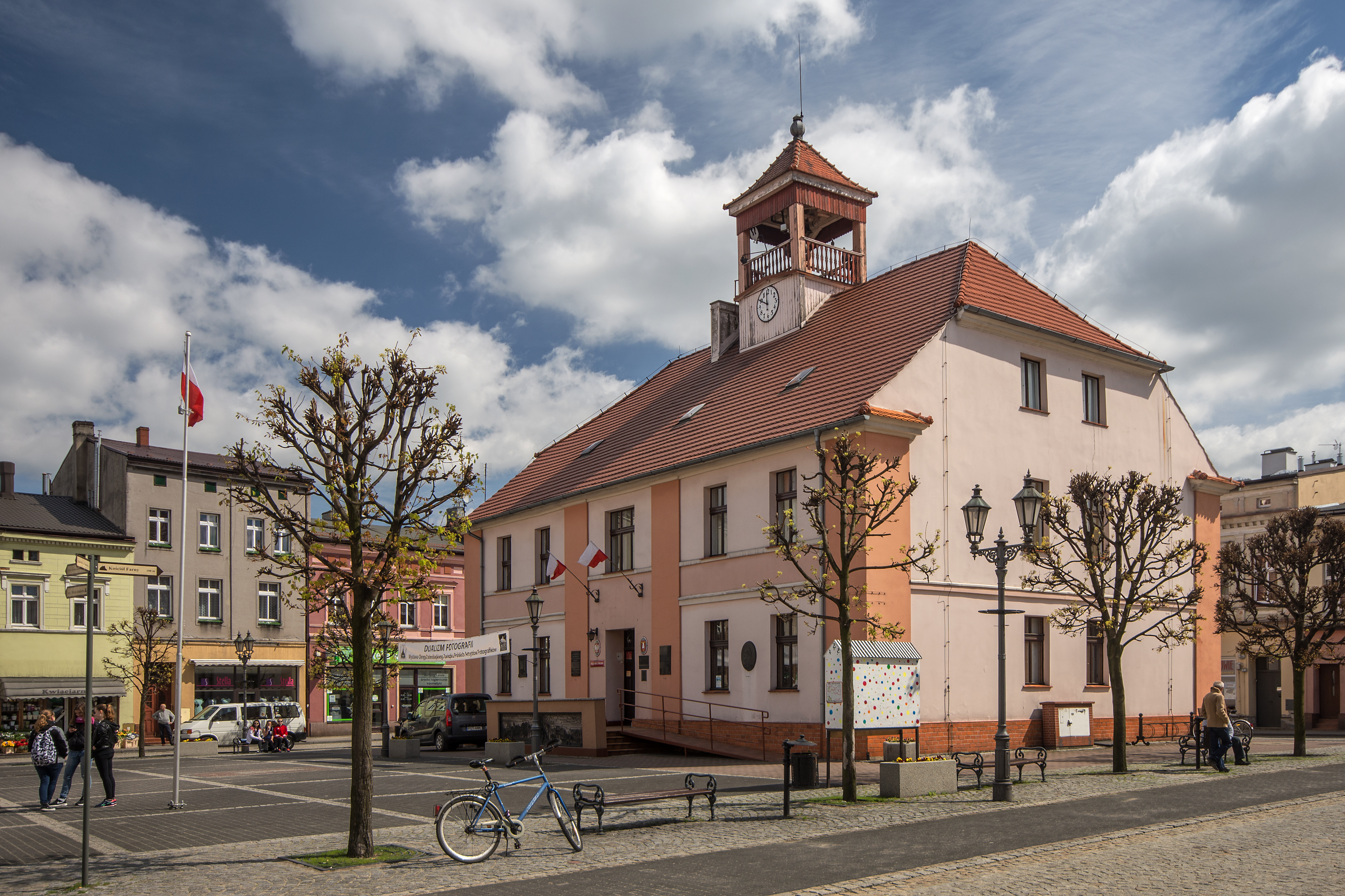 Ostrzeszów, ratusz, ob. muzeum i USC, 1840, pocz. XX